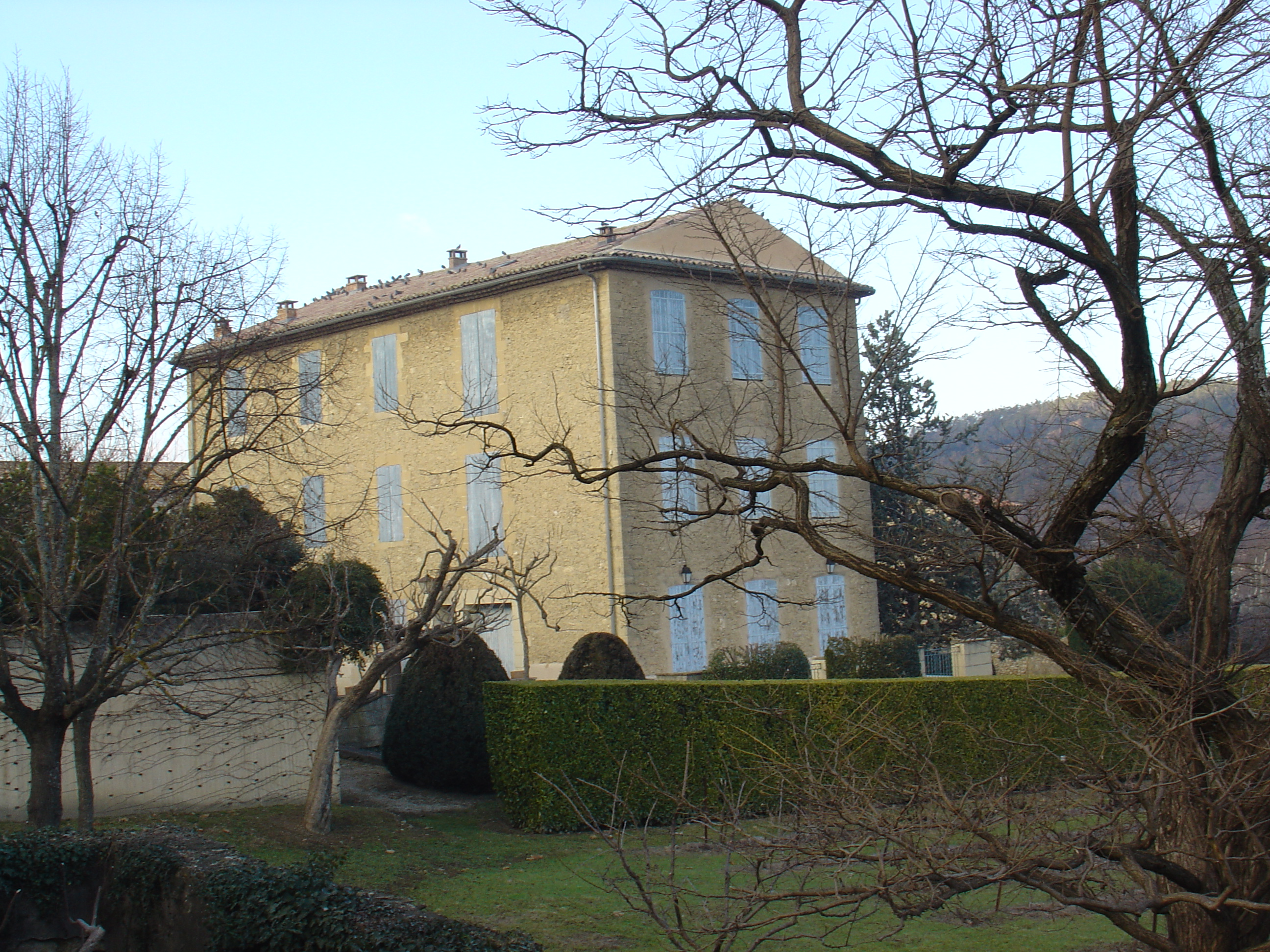 Une magnanerie en Provence (France)